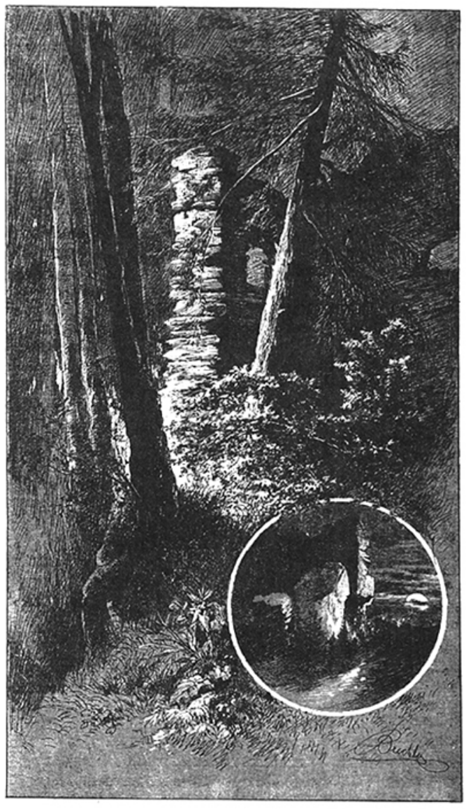 Kresba věže dolního hradu